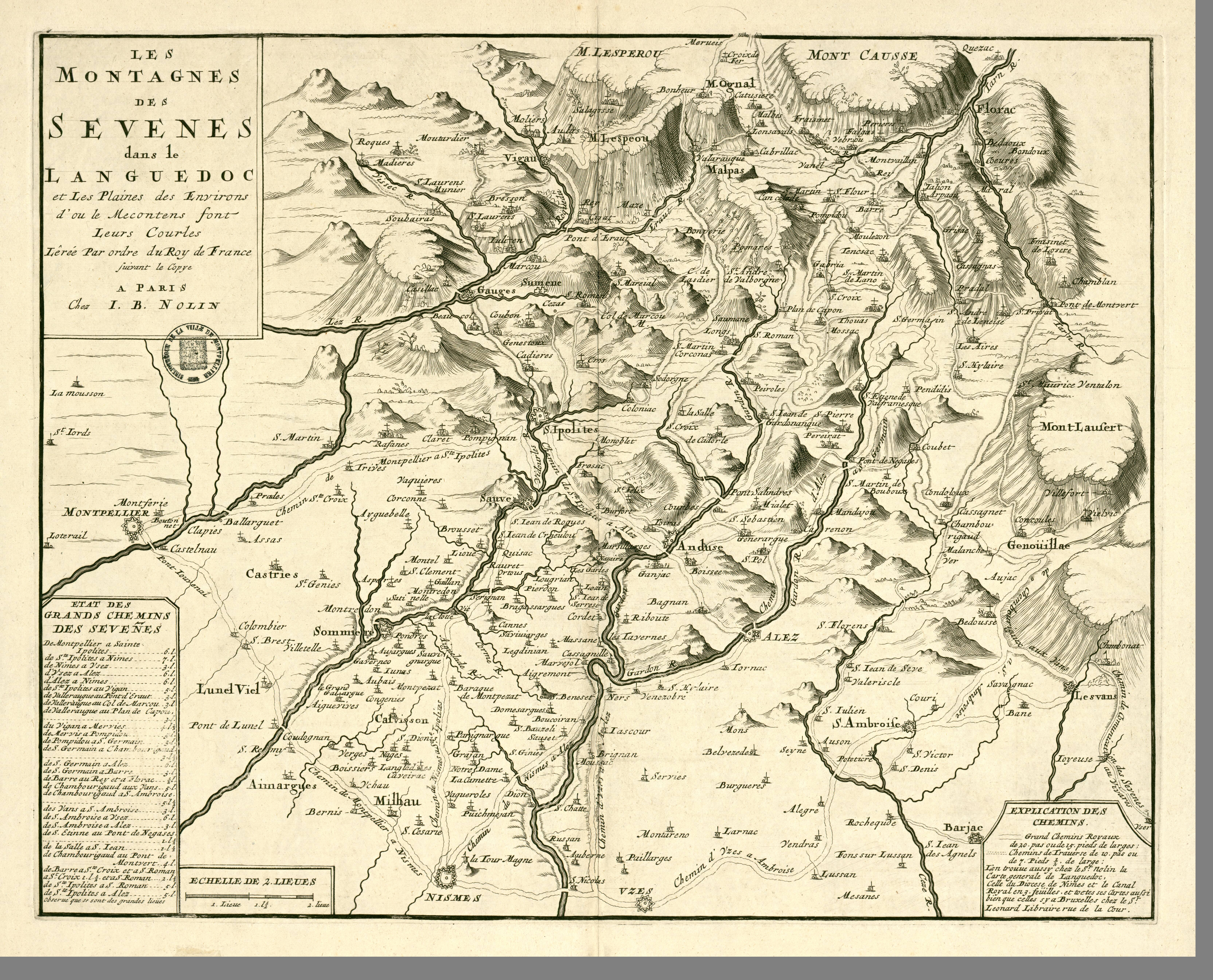 Les Montagnes des Sévenes [Cévennes]